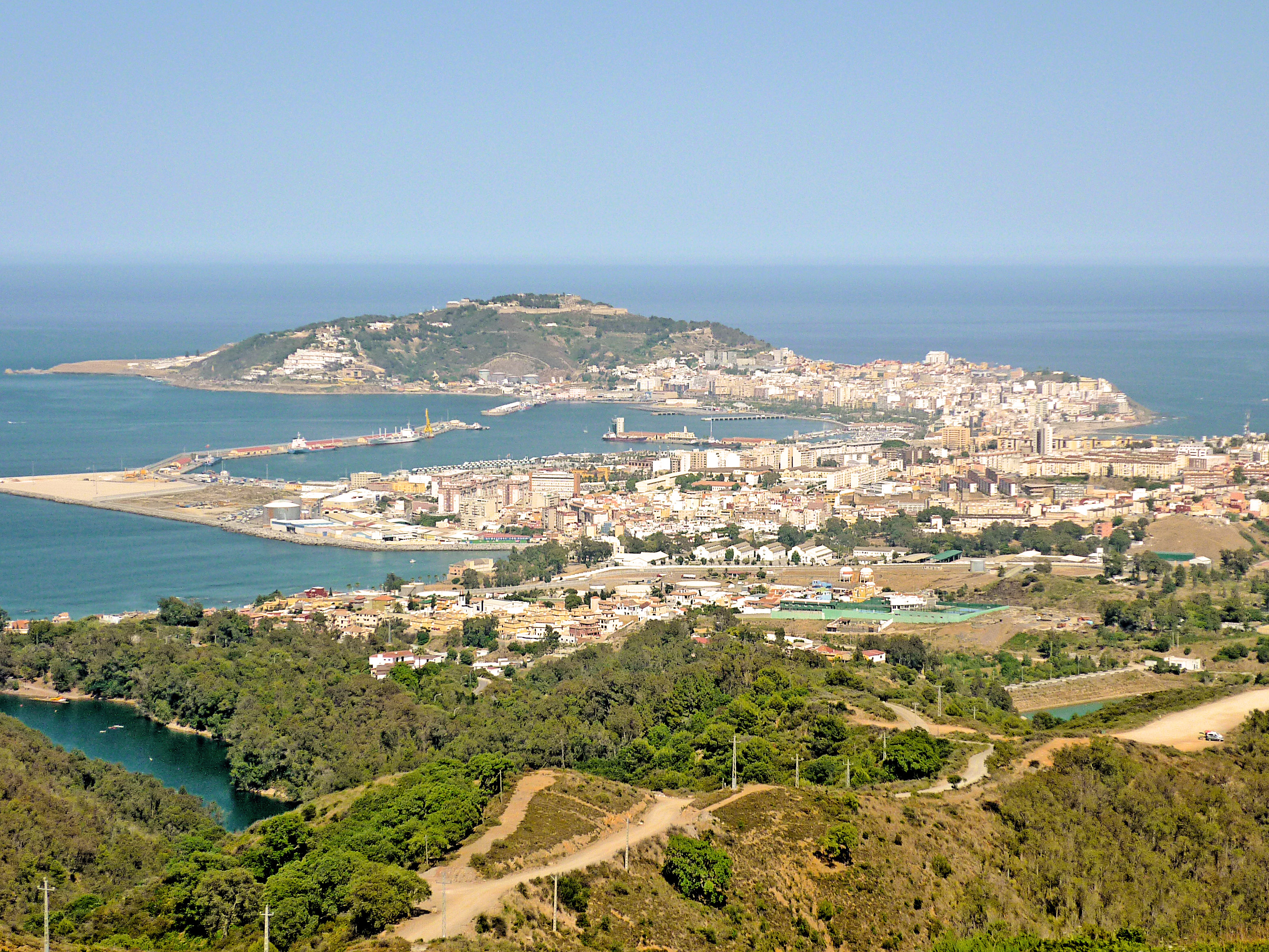 Fotografías de Cañete